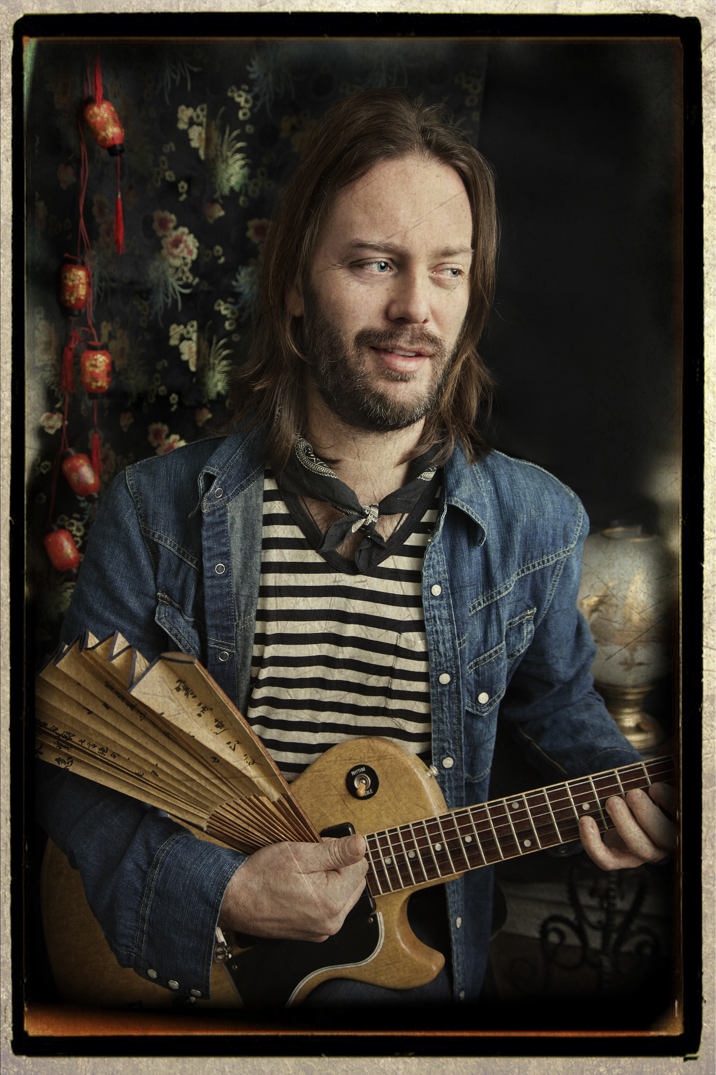 Artisten Niclas Frisk.